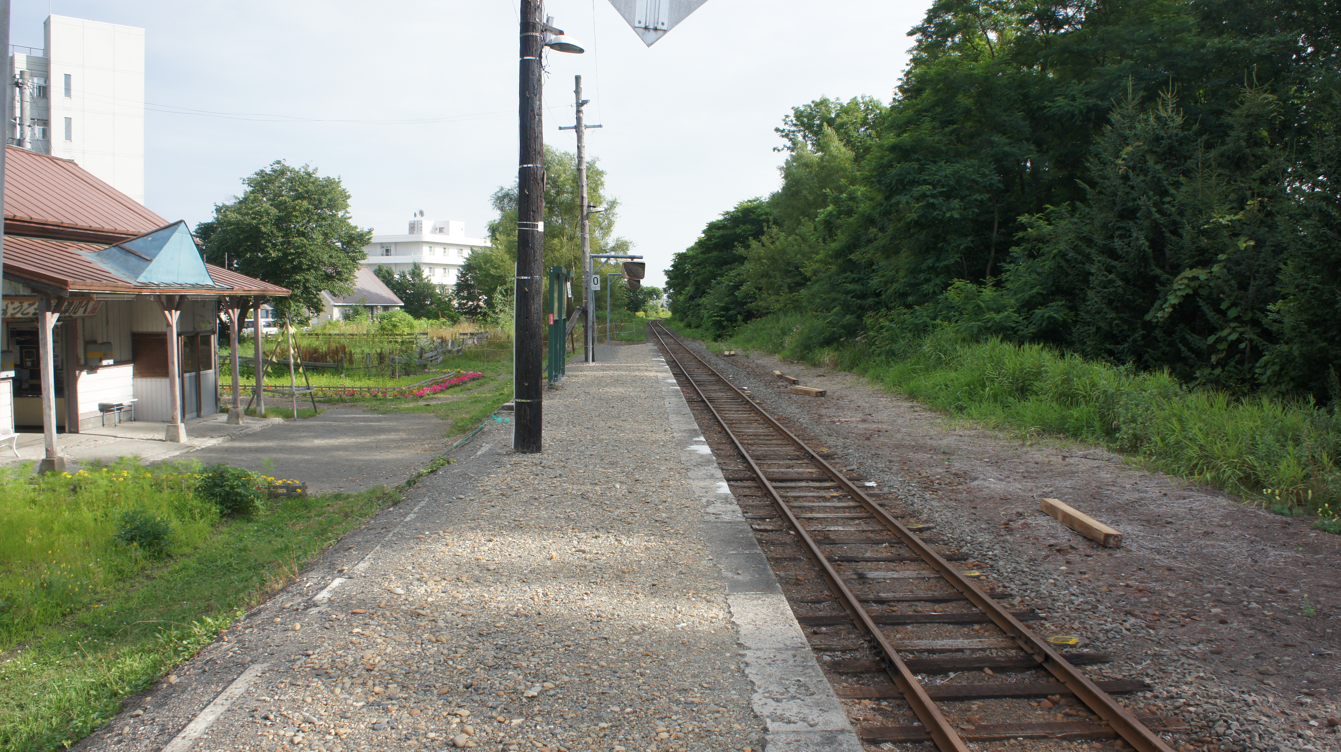 JR札沼線・新十津川駅のホーム